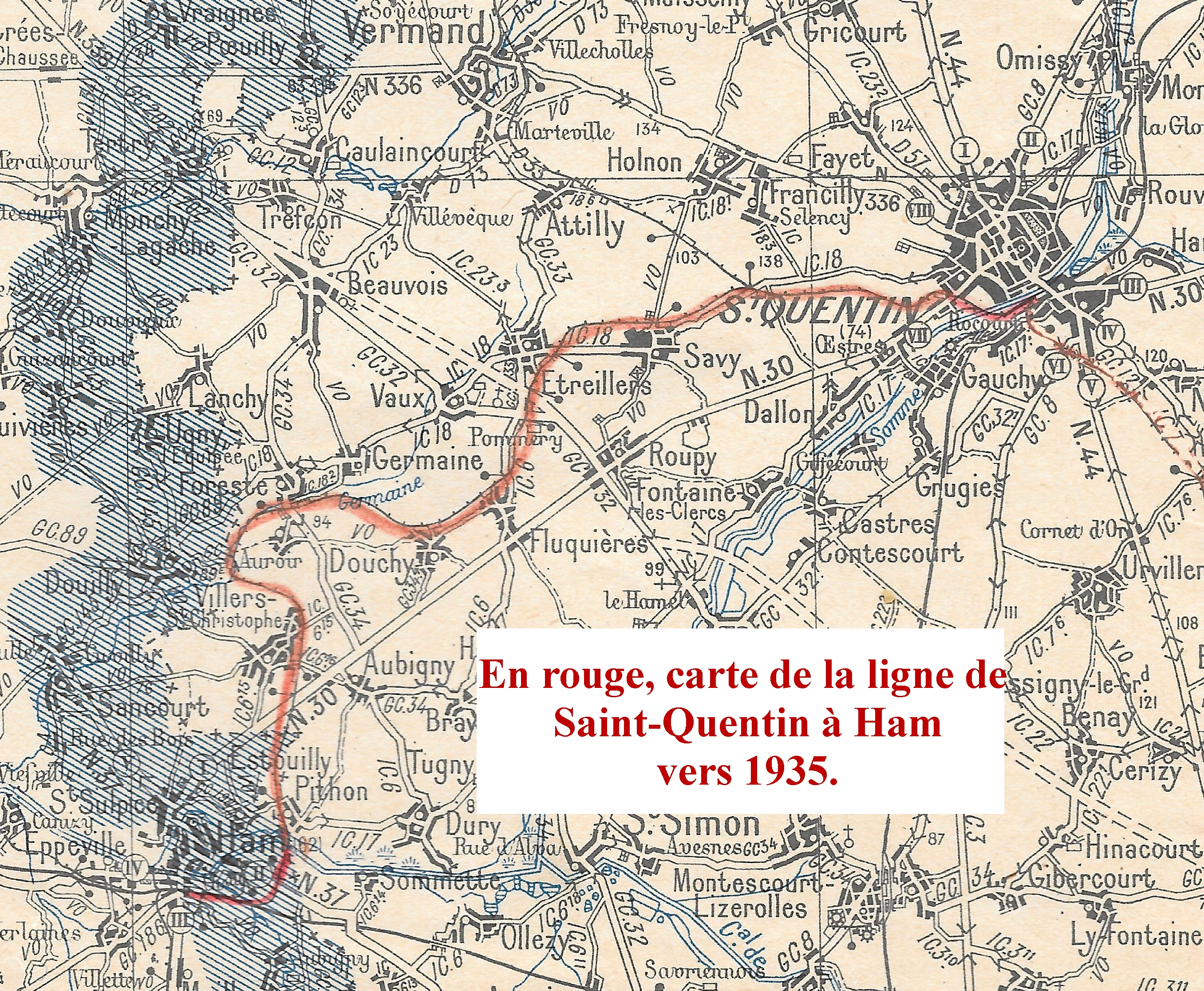 Carte de la ligne de Saint-Quentin à Ham